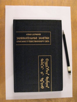 a képen Agvan Dorziev: Zanimatel'nye zametki. Opisanie puteshestvija vokrug sveta (Avtobiografija). RAN, Vostochnaja literatura, Moskva, 2003. könyve látható